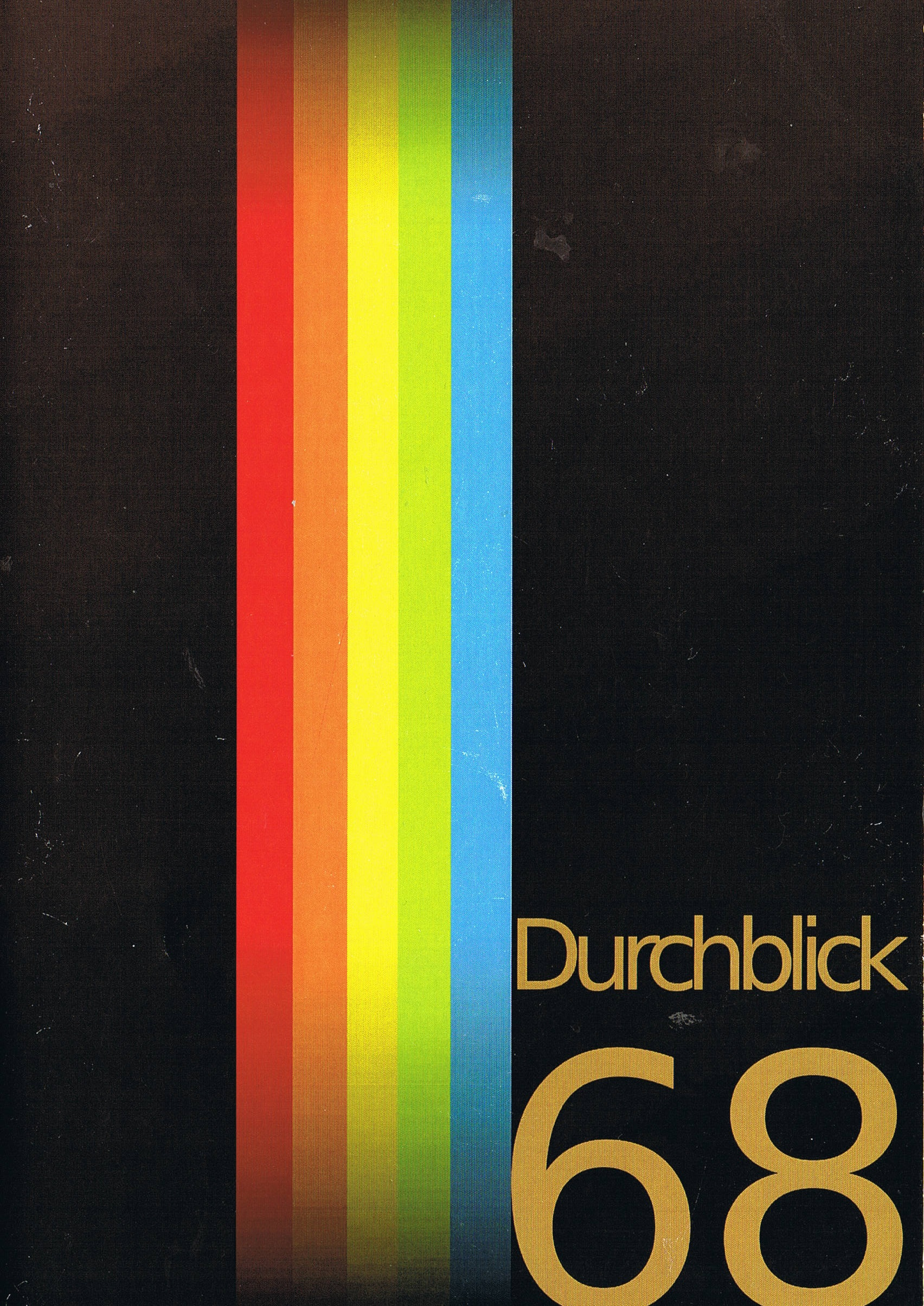 Ausgabe 2013